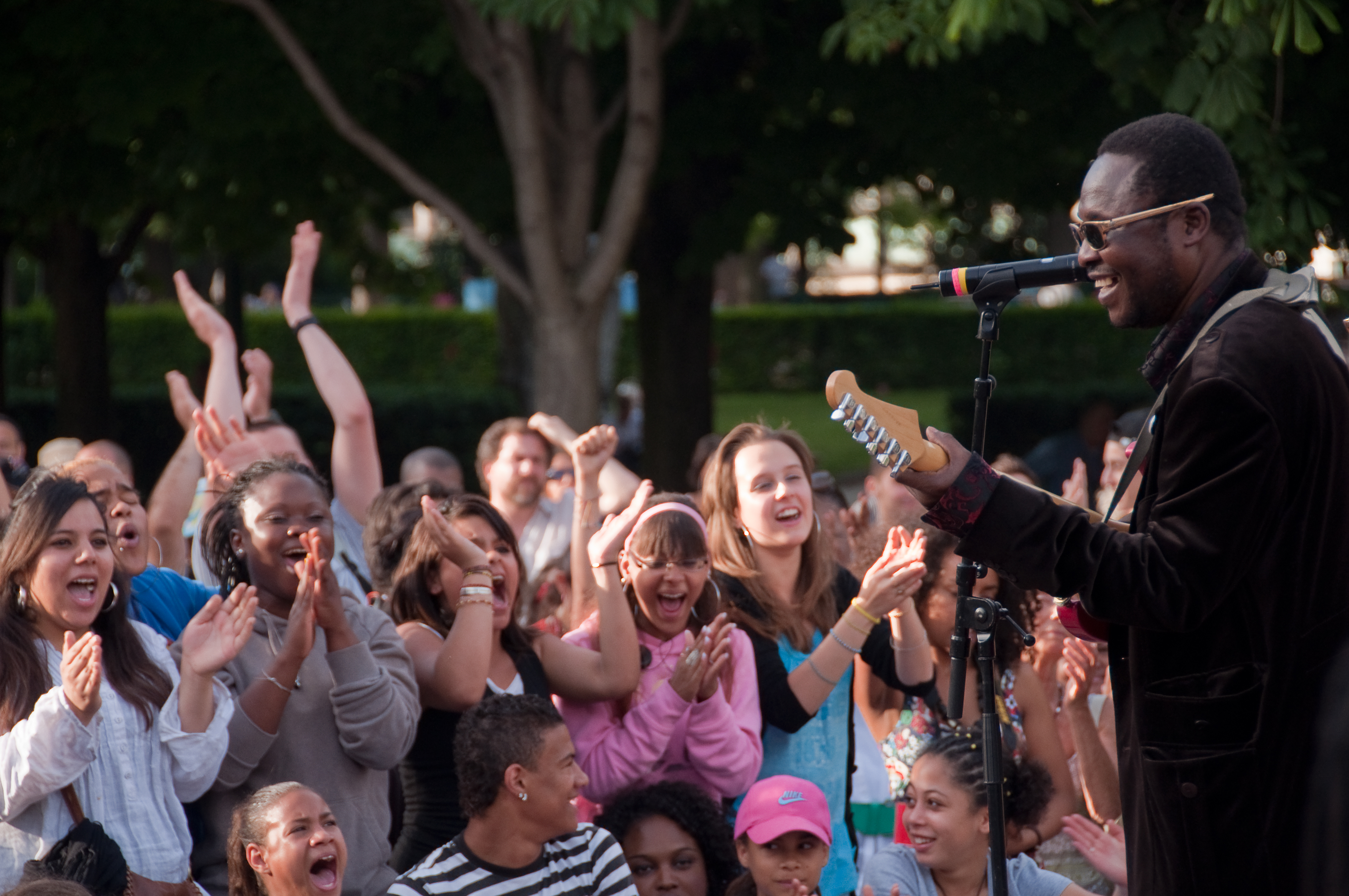 Amadou Bagayoko du duo Amadou & Mariam devant une foule enthousiaste au parc de Choisy pour la sixième édition du concert Jam'Sahel de mobilisation pour la lutte contre la désertification du Sahel.